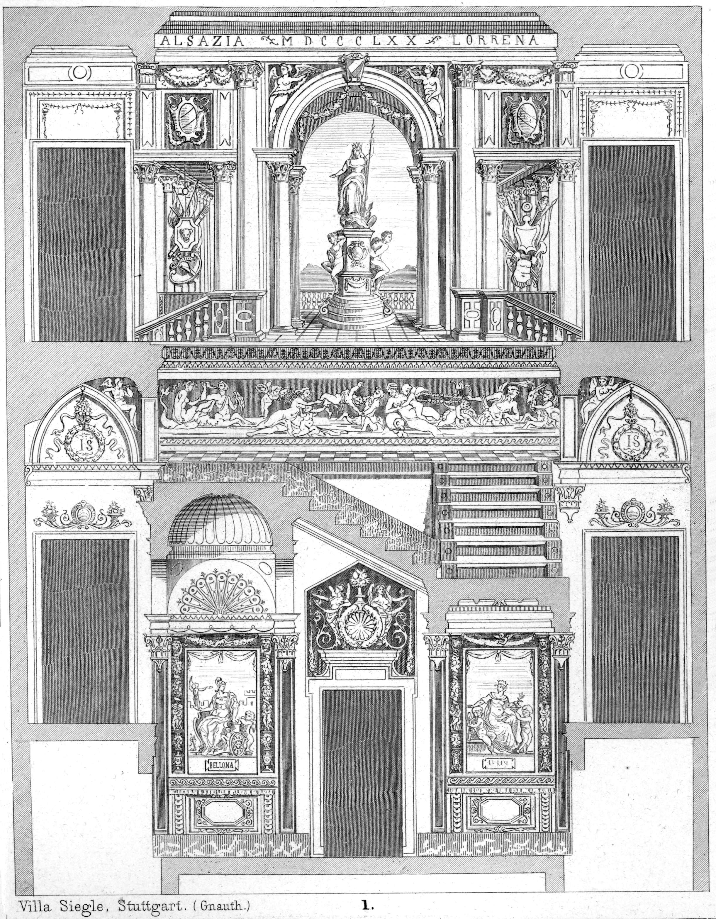 Villa Siegle in Stuttgart, 1871, Architekt: Adolf Gnauth. Schnitt durch das Treppenhaus. Unten die Personifikationen von Krieg (Bellona) und Frieden, oben die Siegesgöttin Viktoria, darüber die Inschriften "Alsazia" (Elsass) und "Lorena" (Lothringen), dazwischen die Jahreszahl MDCCCLXX (1870) als Verweis auf den Deutsch-Französischen Krieg 1870/1871.